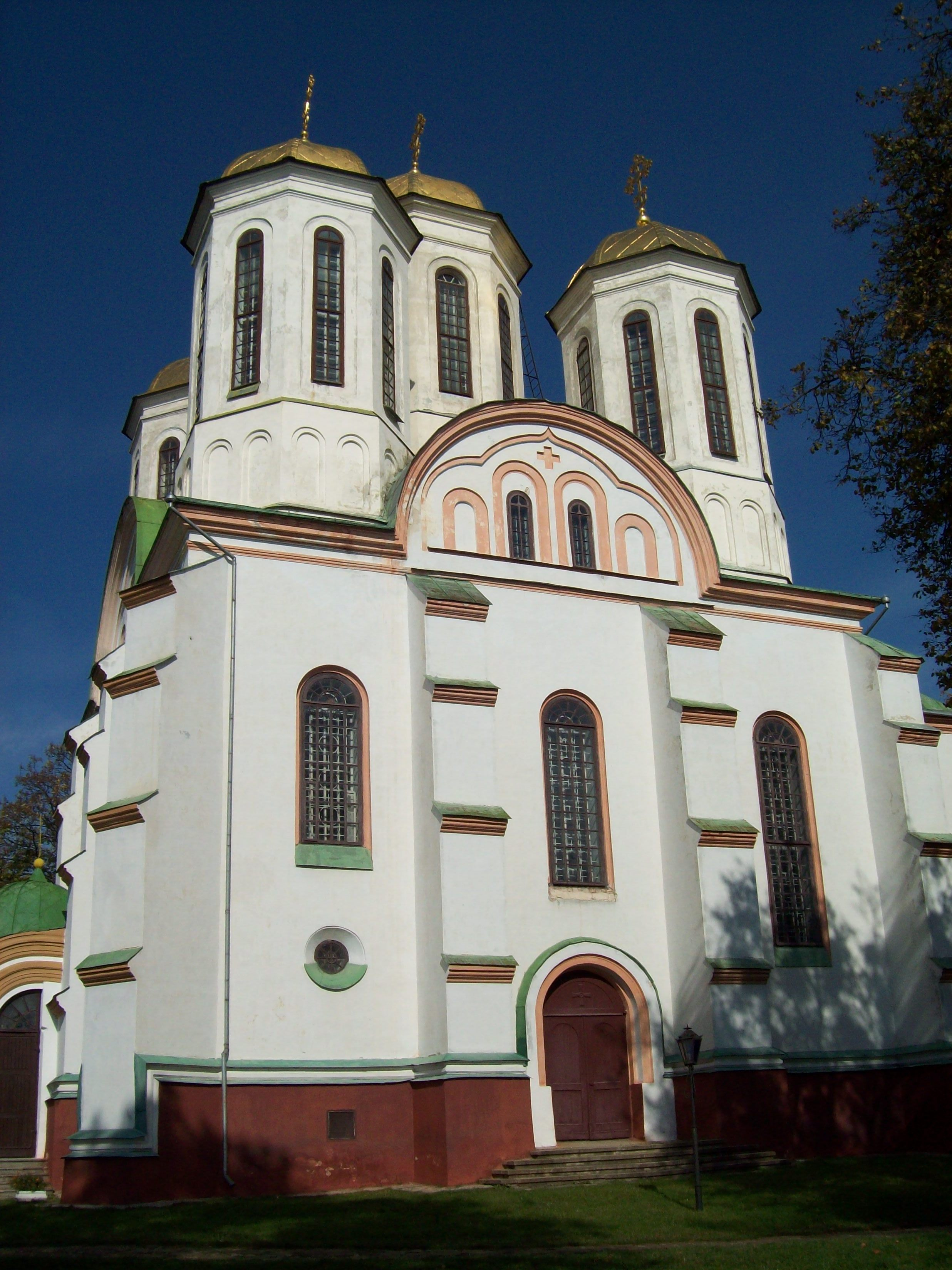 знято фотоапаратом Кодак